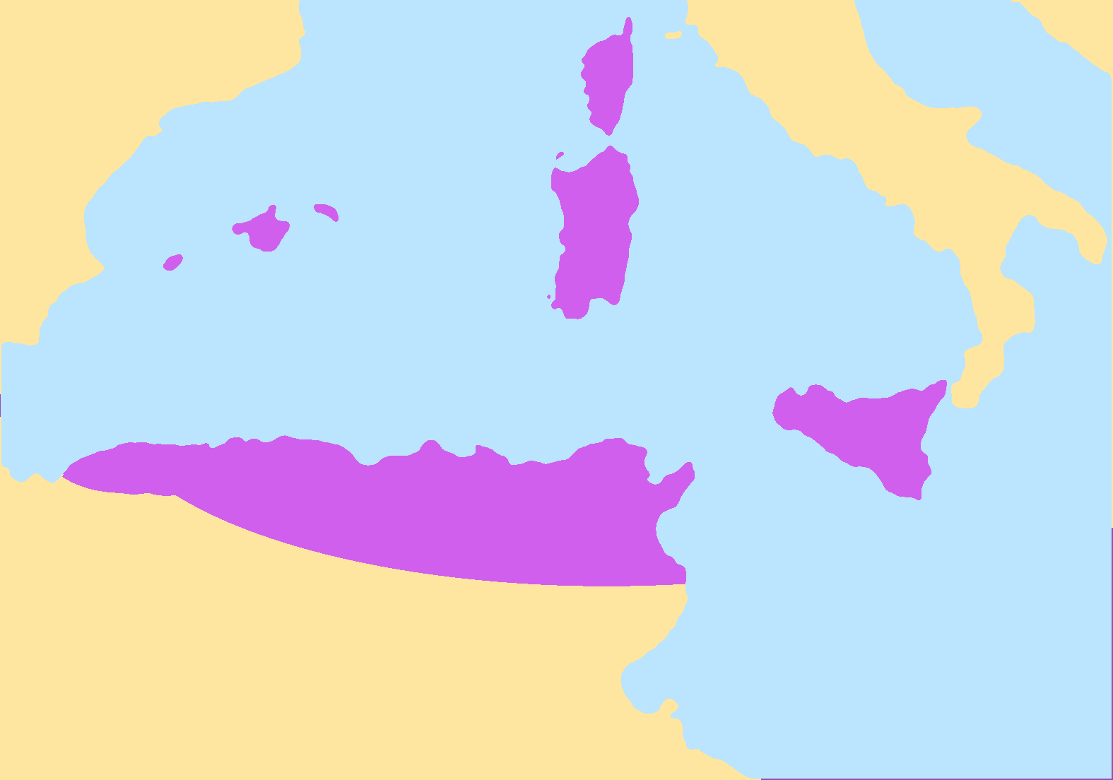 vandal empire at its maximum